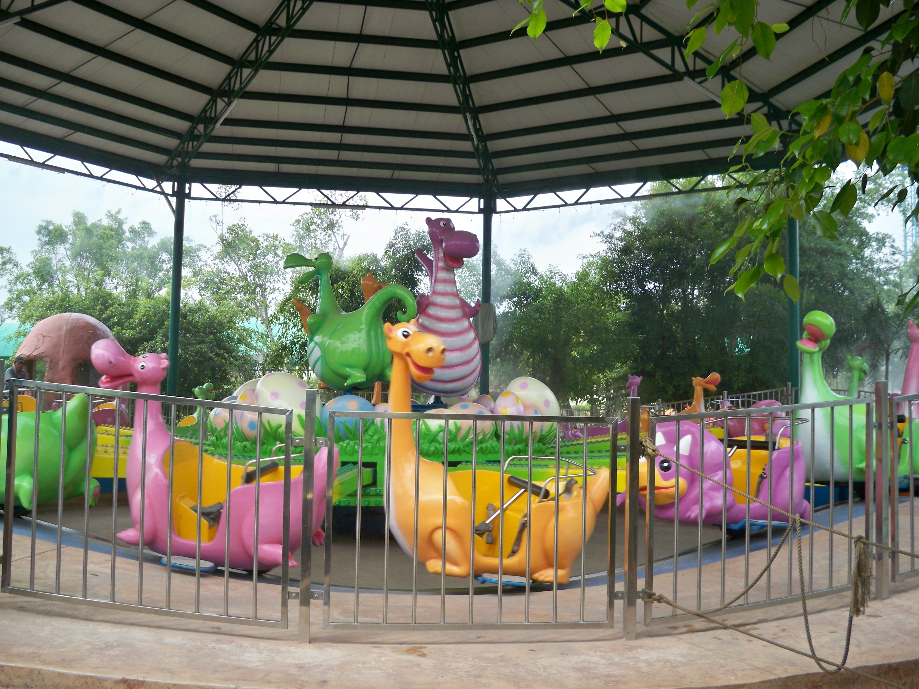 Khu trò chơi Trứng khủng long